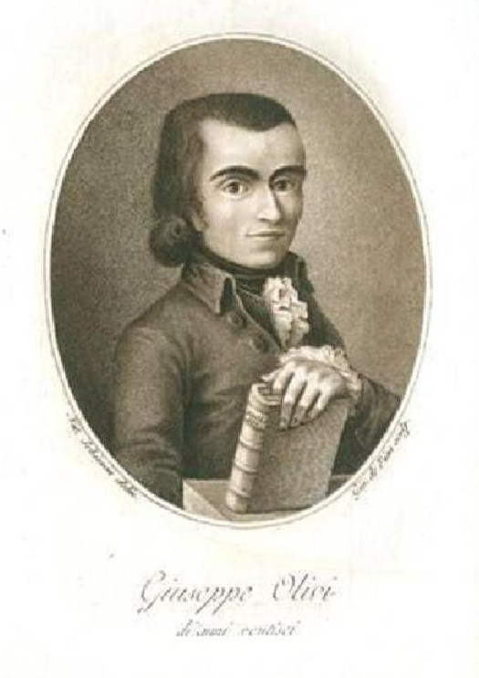 Foto tratta da "Elogio dell'abate Giuseppe Olivi" di Melchiorre Cesarotti (si trova accanto al frontespizio dell'operetta), Padova 1795.